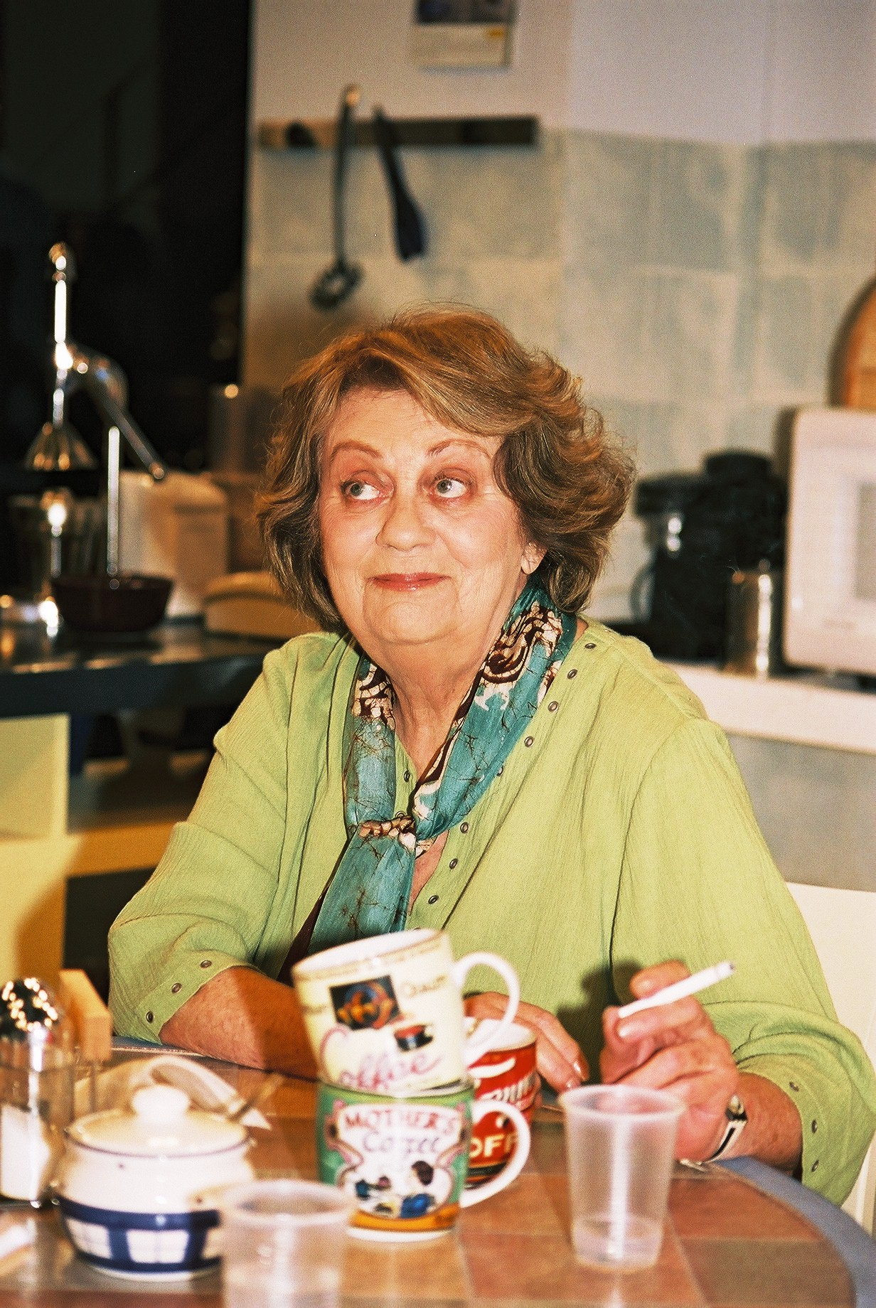 צוות תוכנית הטלוויזיה קרובים קרובים של הטלוויזיה הלימודית חנה מרון במטבח